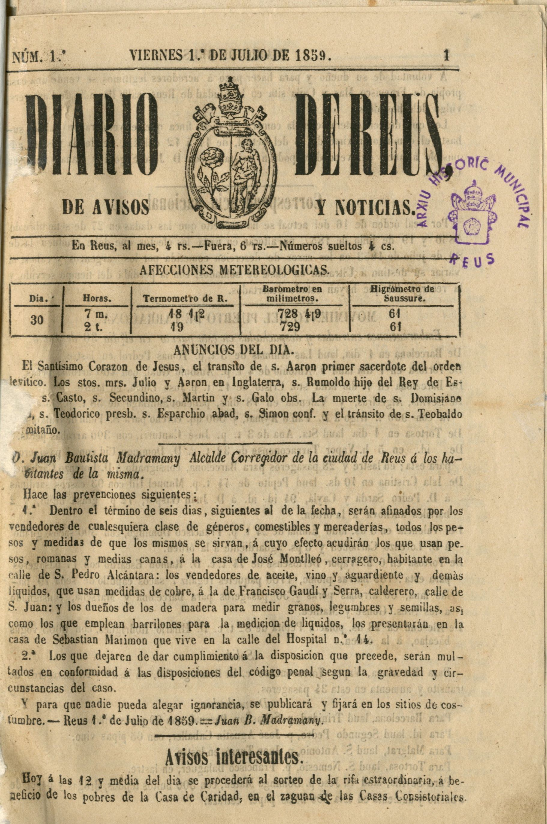 Primera pàgina del Diario de Reus 1859